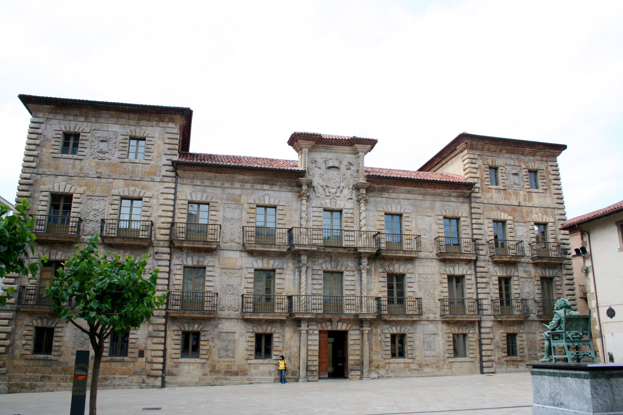 Escuela de Arte de Avilés